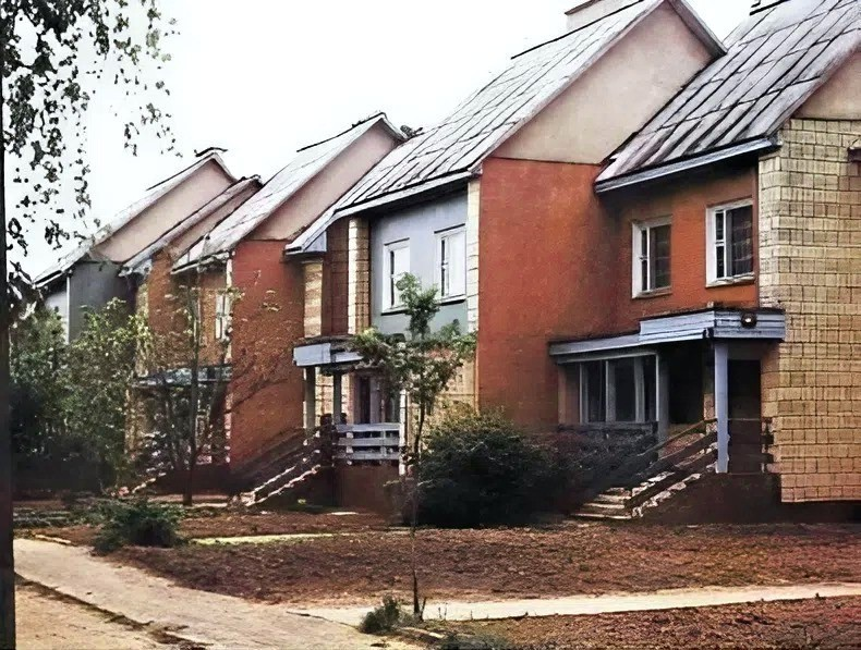 Агрогородок Михалево